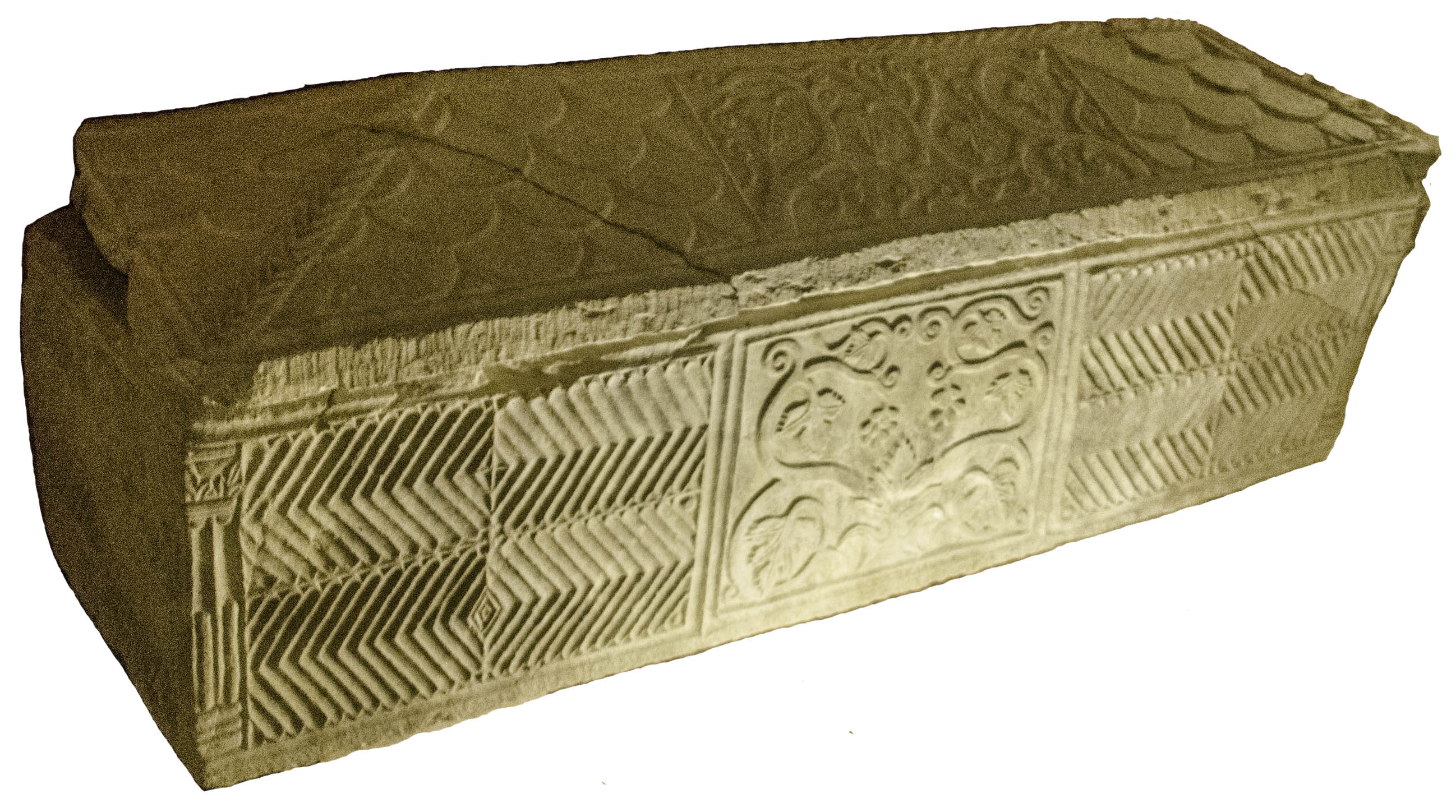 Sarcophage en marbre blanc, école d’Aquitaine, Ve s. Musée Eugène-Camoreyt de Lectoure, Gers, France.